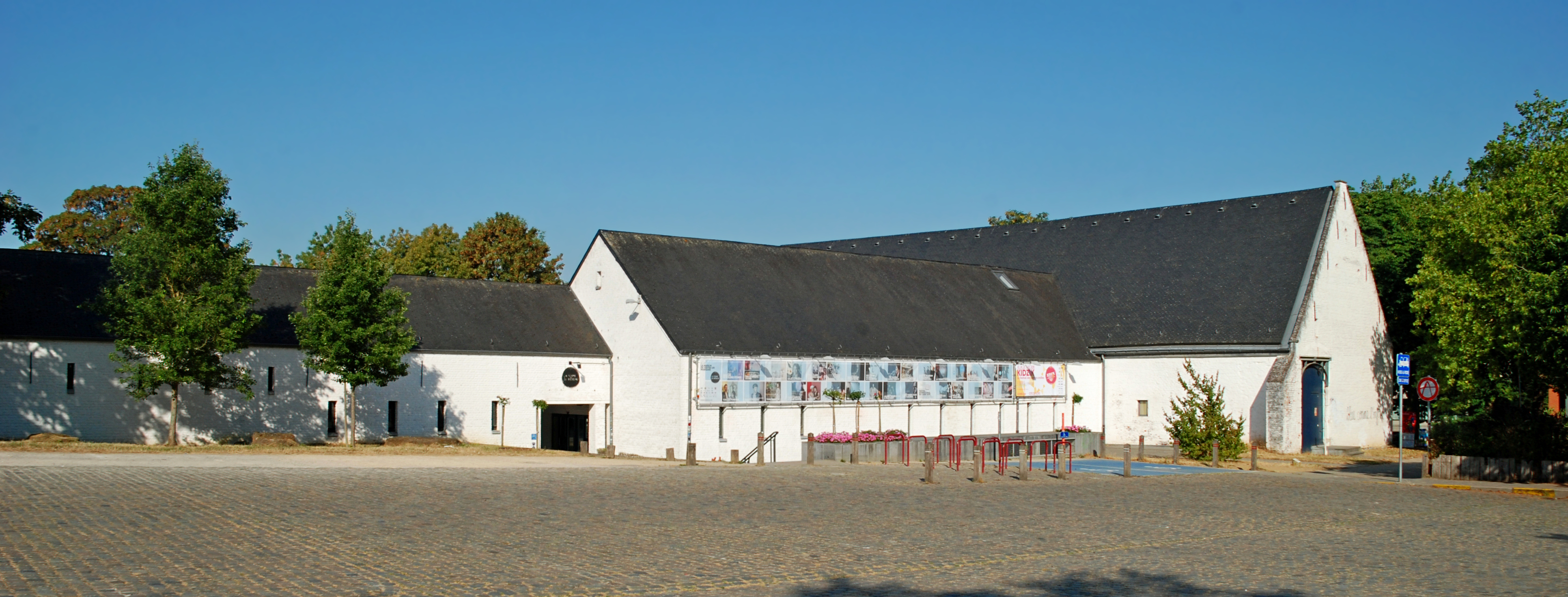 Belgique - Brabant wallon - Louvain-la-Neuve - avenue du Jardin Botanique - Ferme du Biéreau This photo of immovable heritage has been taken in the Walloon Region